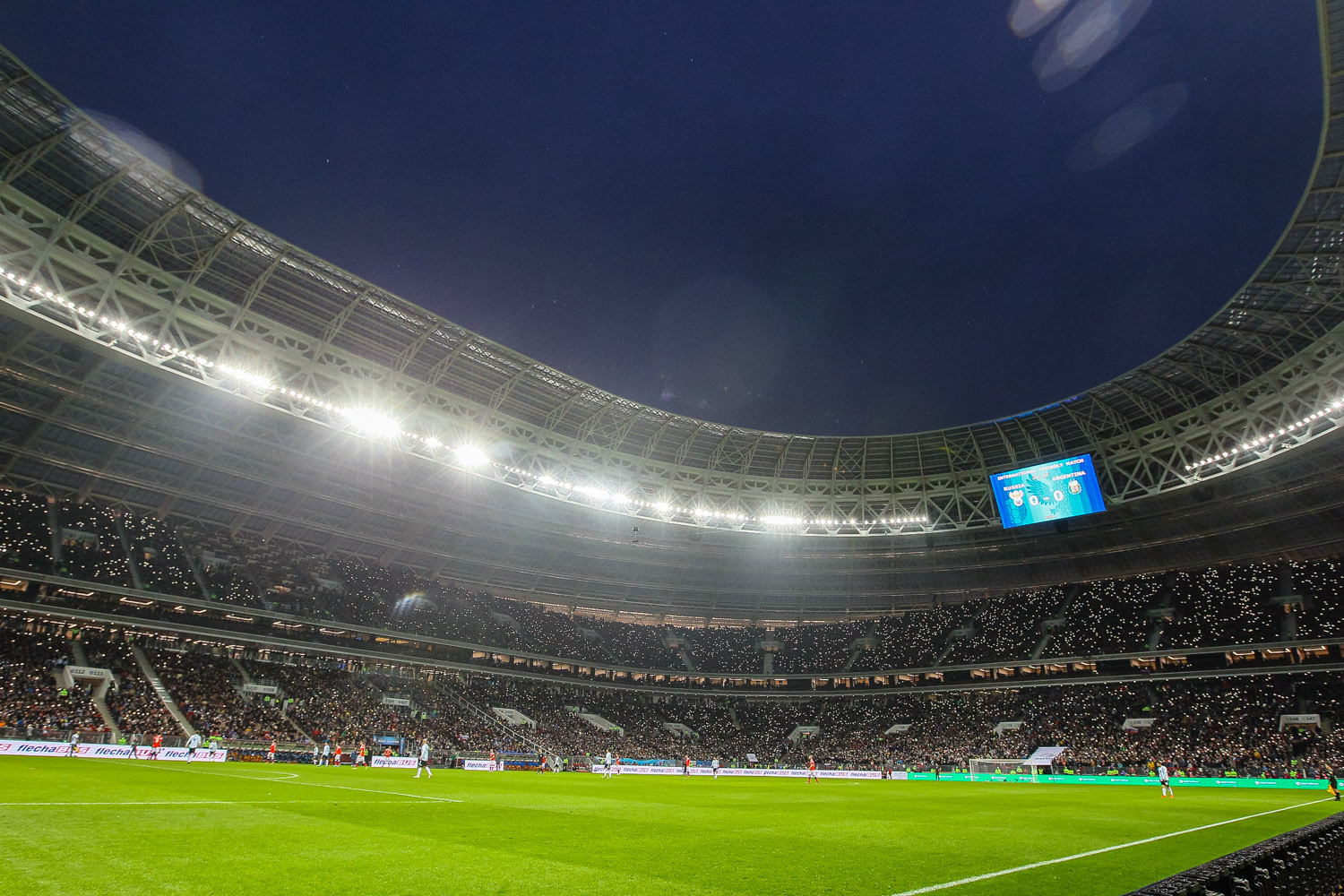 Месси и Ко обыграли сборную России